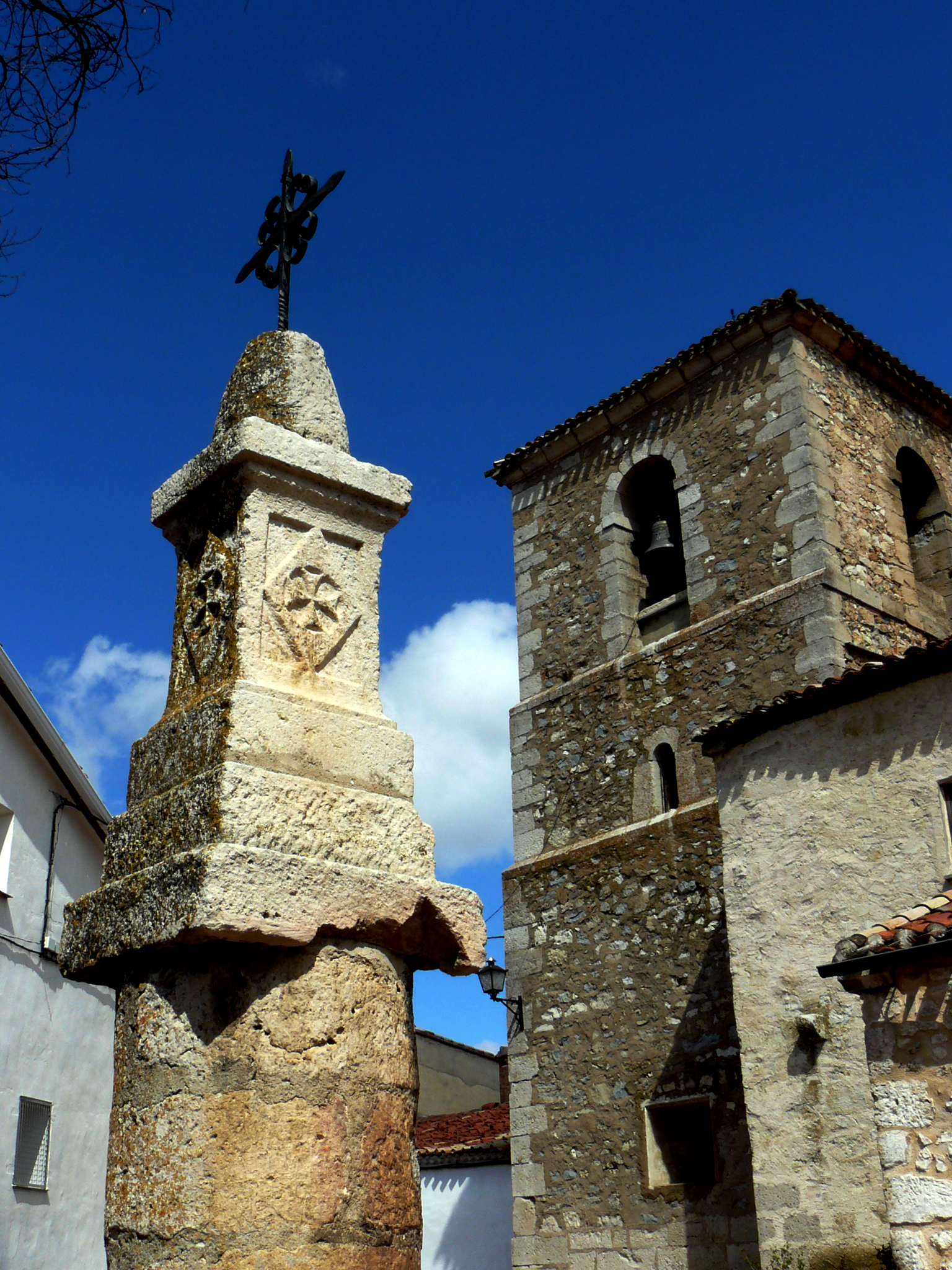 Iglesia del pueblo y crucero.